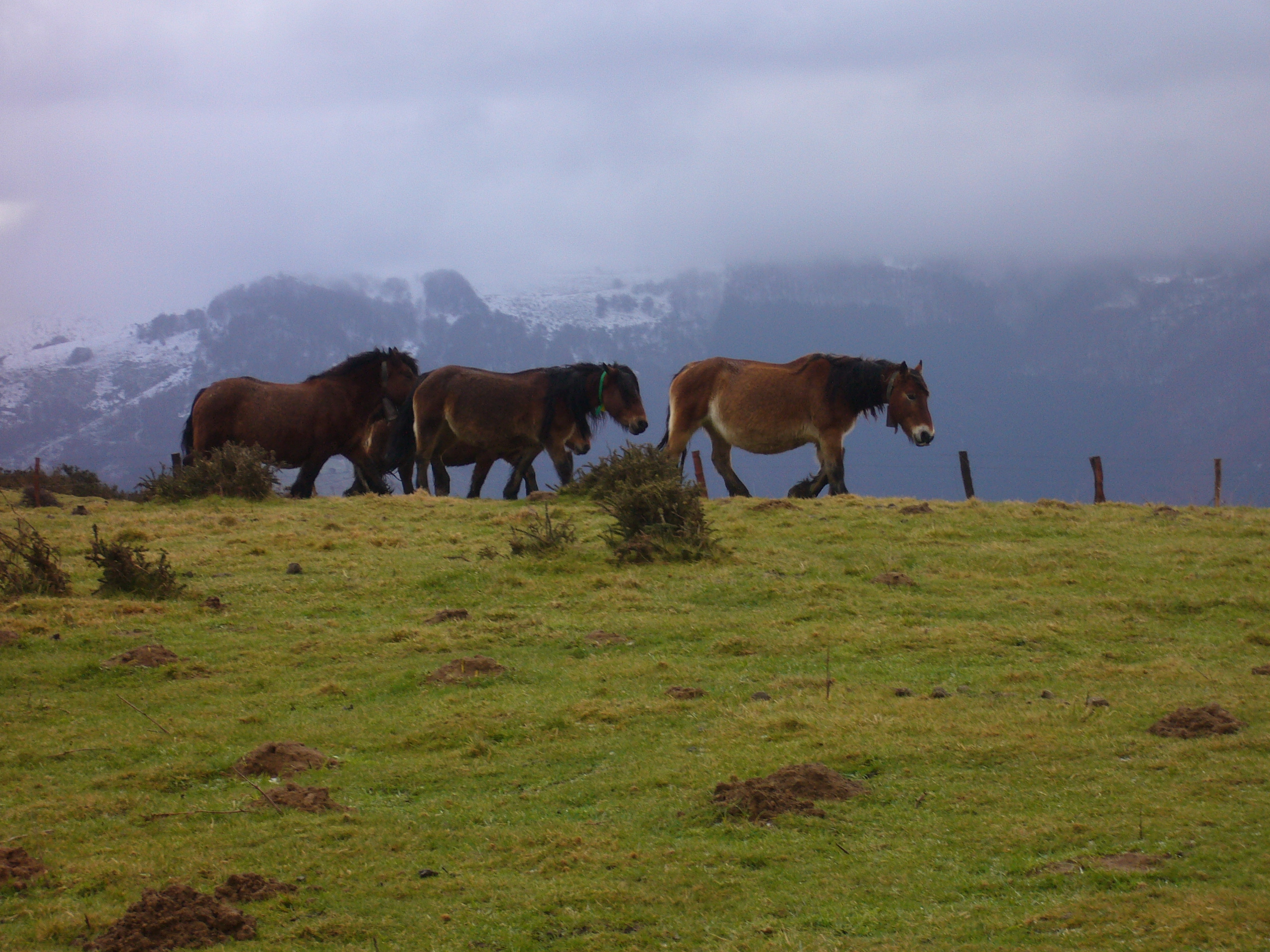 Mendiko zaldiak. Samalda Pagoetako Natura Parkean